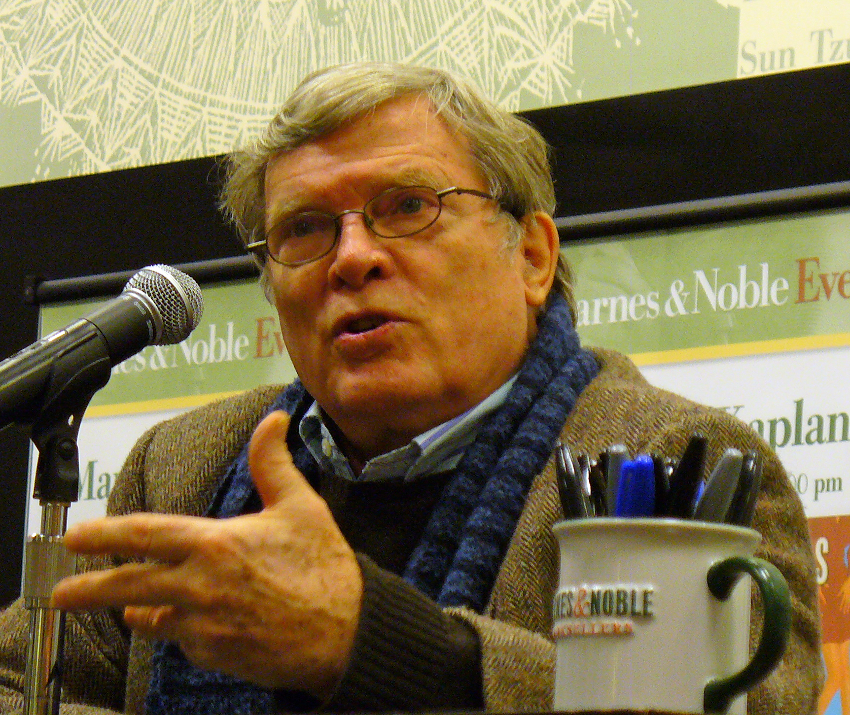 D. A. Pennebaker by David Shankbone